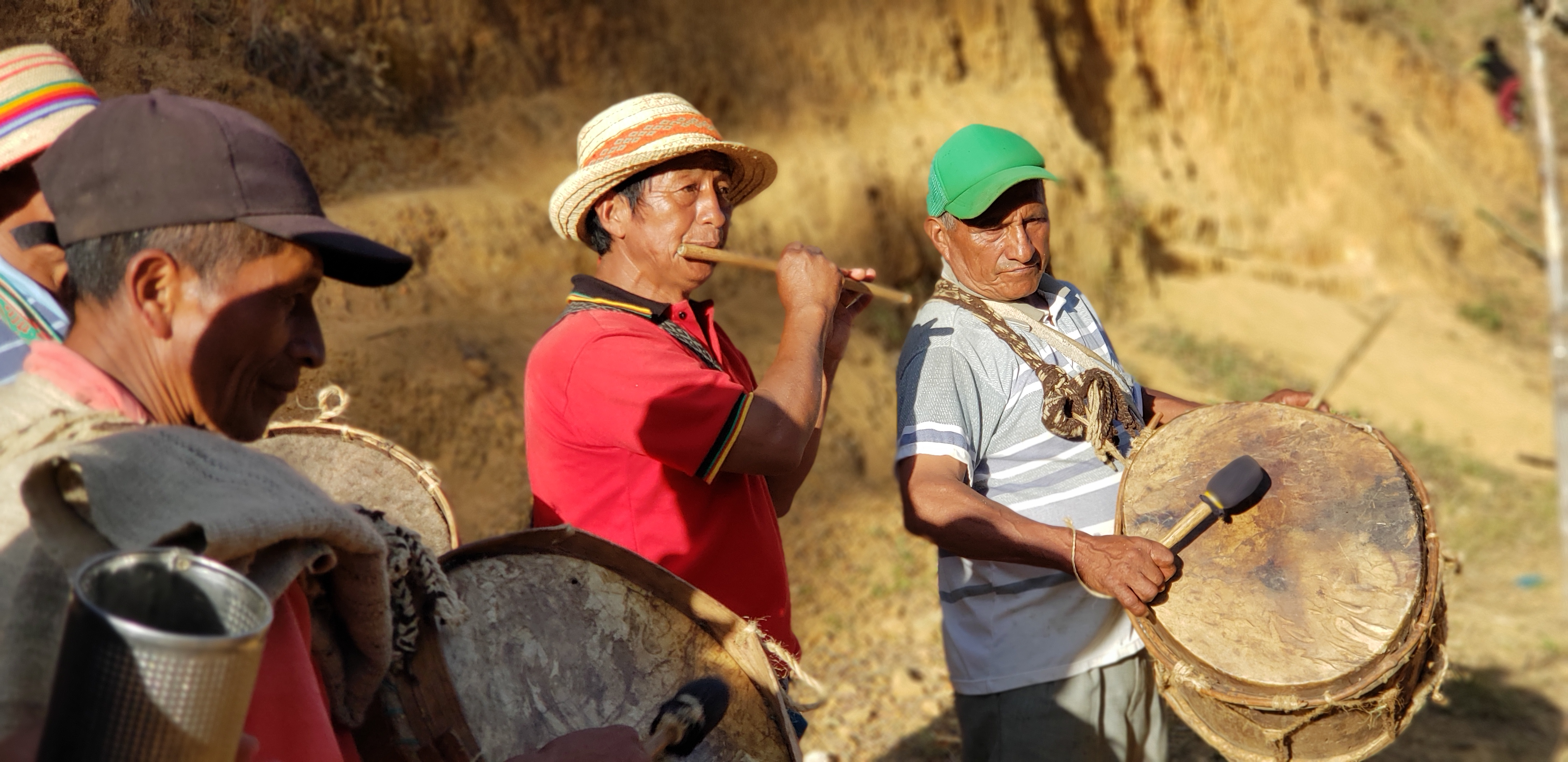 Músicos indígenas del pueblo nasa en Jambaló - Cauca - Colombia, interpretando música con flautas y tambores